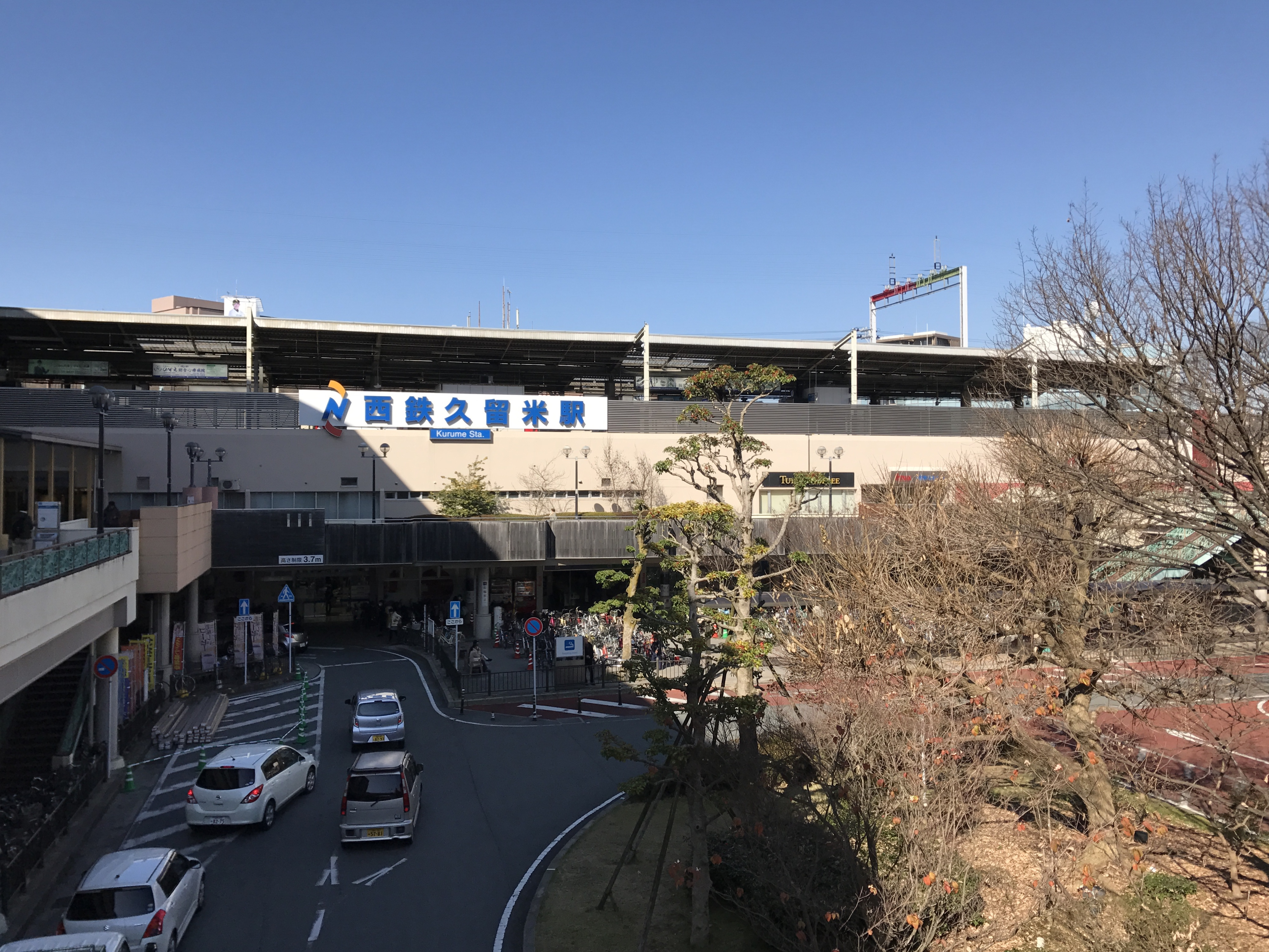 西鉄久留米駅駅舎